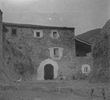 Façana de Can Puig. Santiago Perdigó i Díaz Caneja (1914-09)